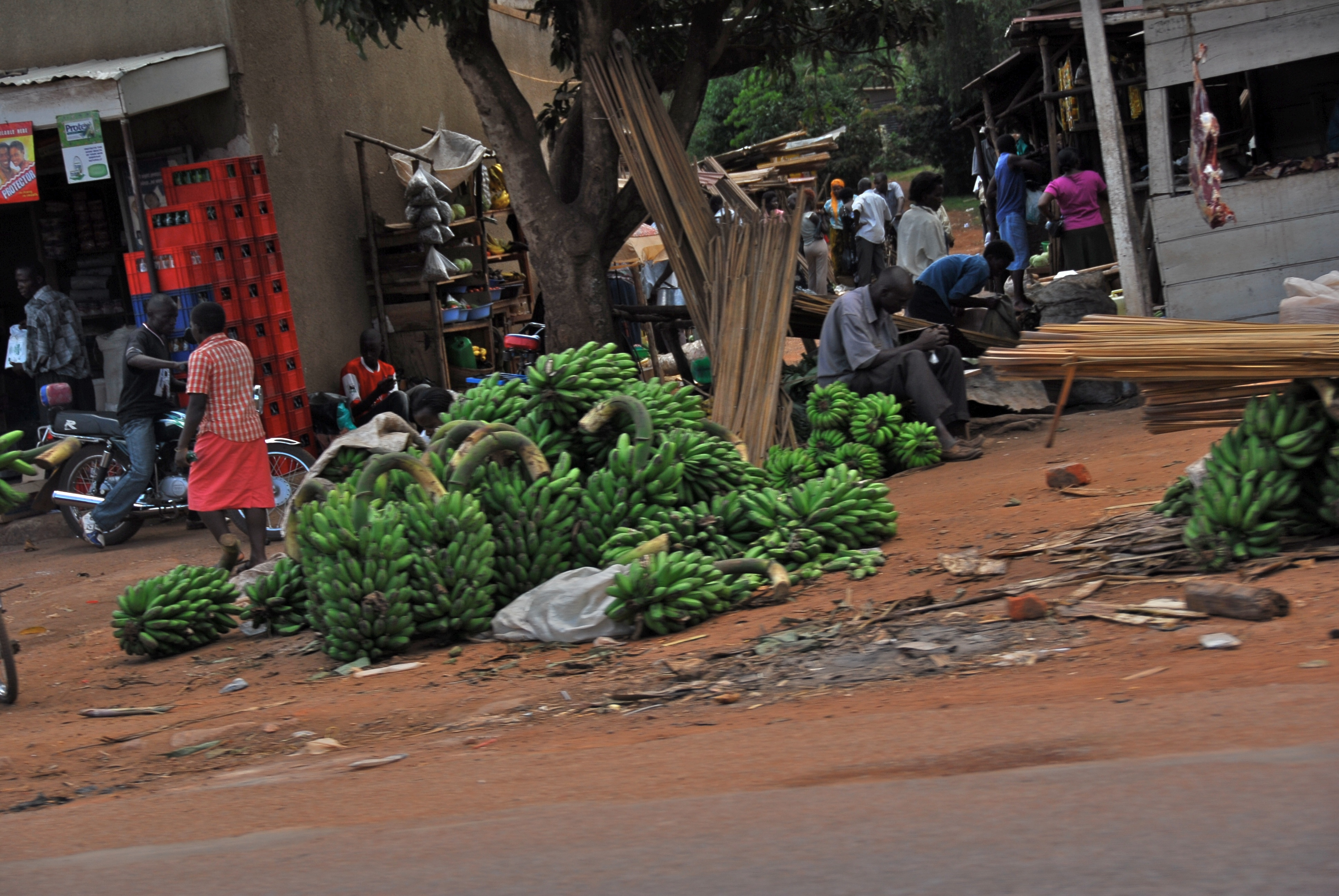 Kampala